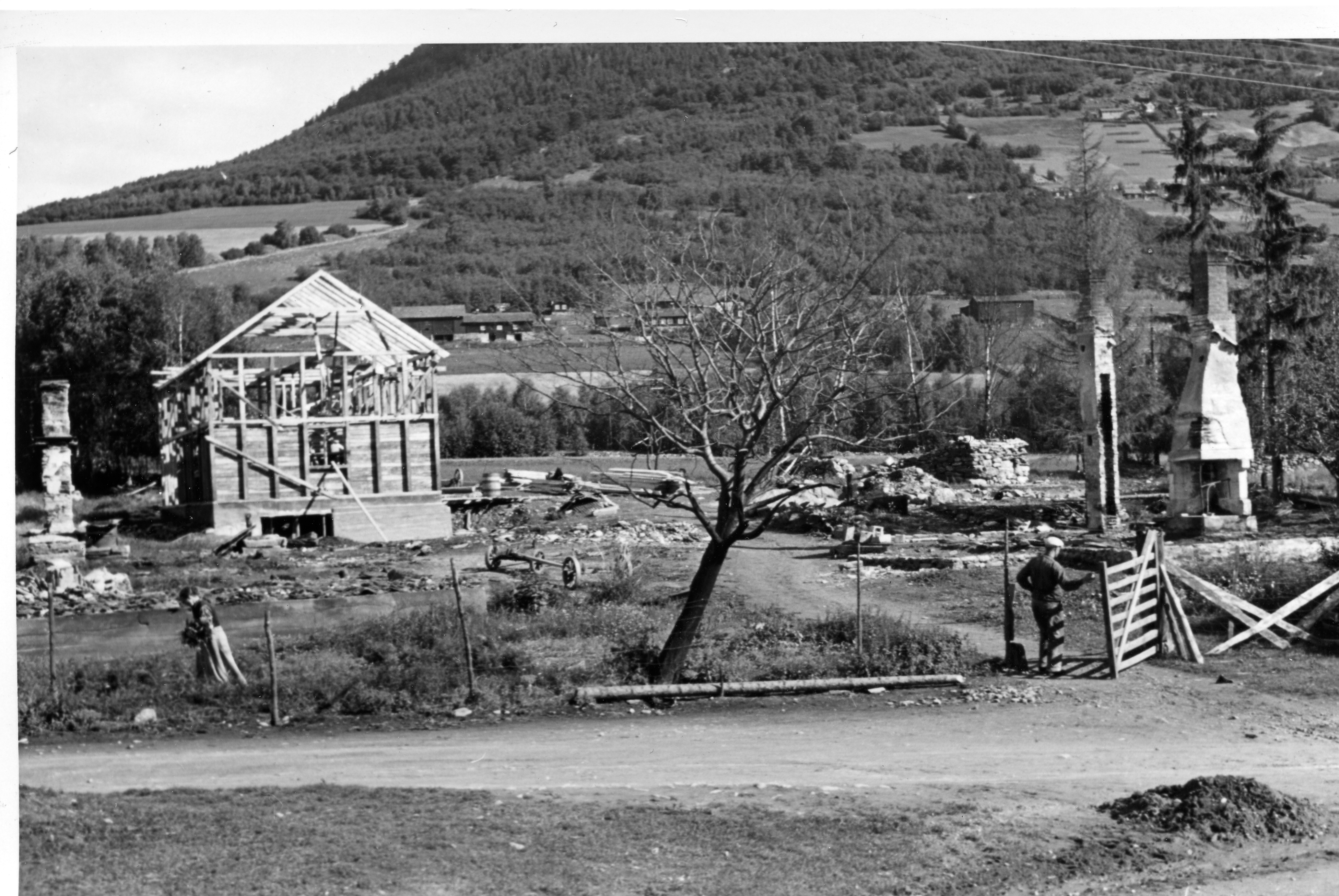 Bildet er hentet fra Arkivverket. Ødeleggelser i Kvam i Gudbrandsdalen etter bombing våren 1940. Arkivinstitusjon : Riksarkivet Arkivnavn : Løken, Hallvard Sted : Norge, Oppland, Nord-Fron, Kvam Emneord: 2. verdenskrig, Andre verdenskrig Avbildet